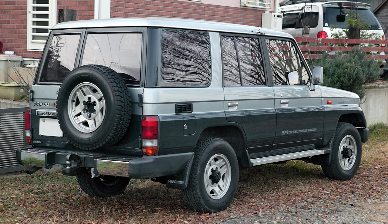 Toyota Land Cruiser Prado Semi long 2.4 Turbo Diesel EX5 ( LJ78G )